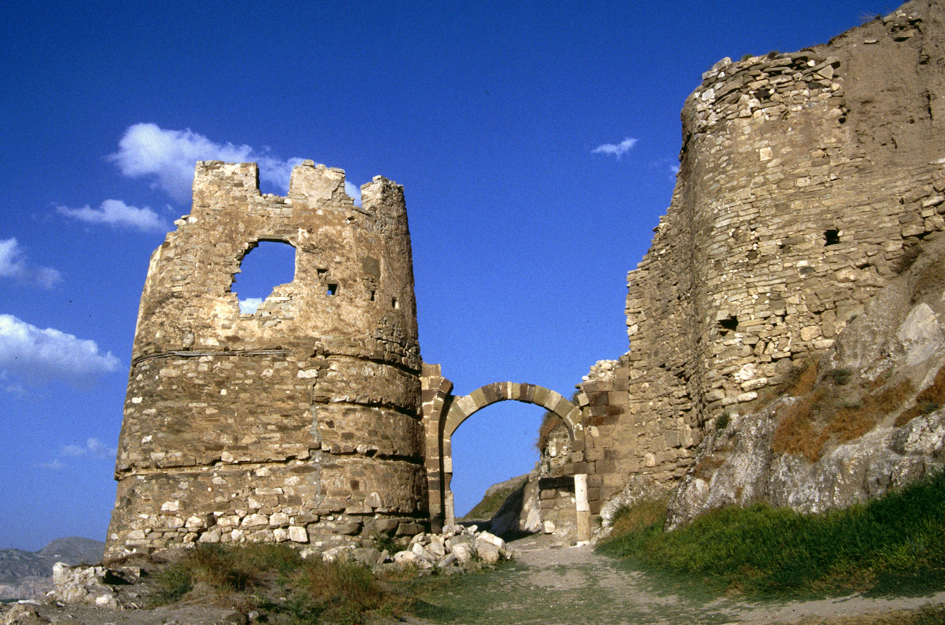 Tušpa, Zitadelle